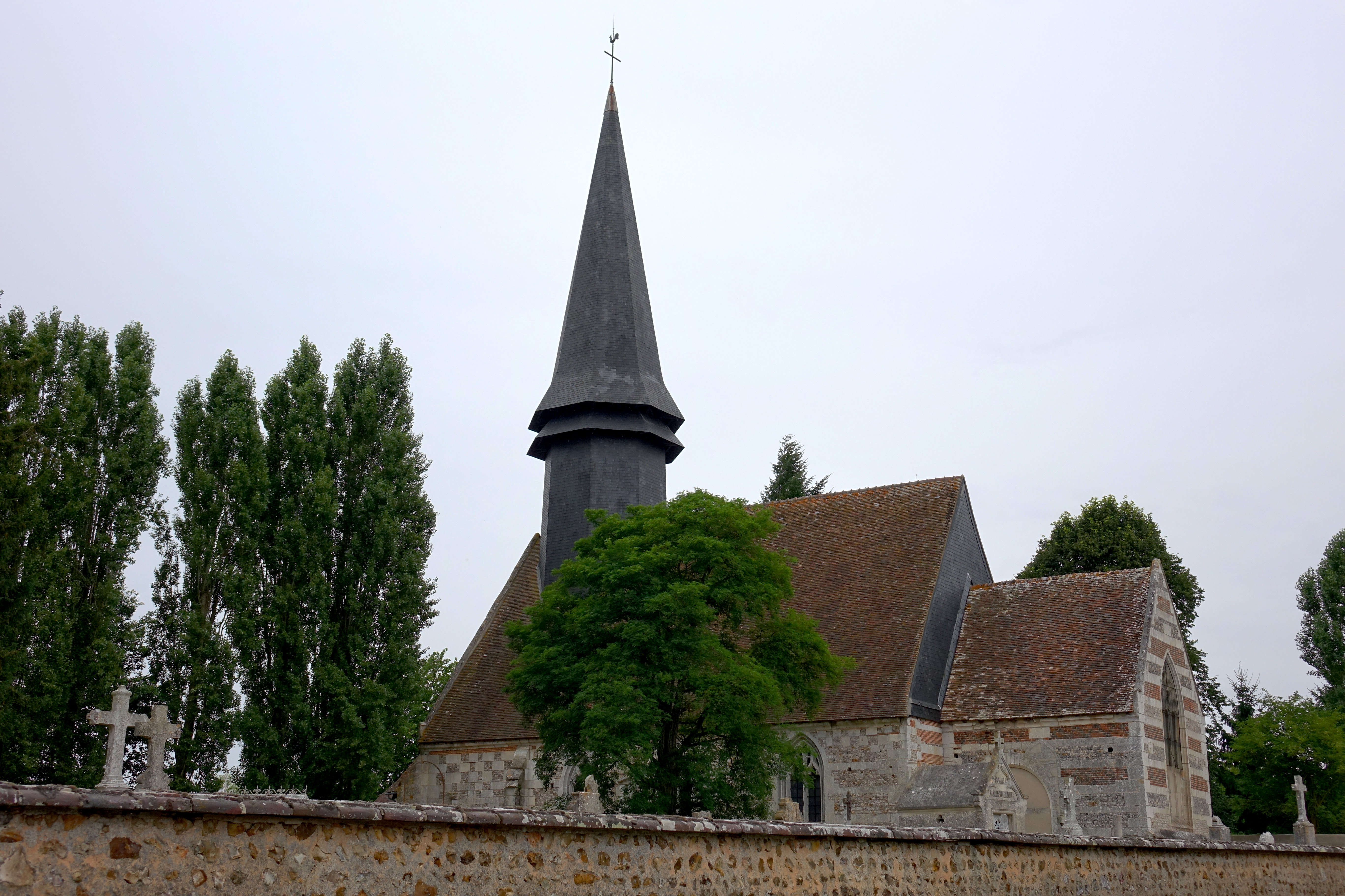 Eglise de Beaubray, Eure, France